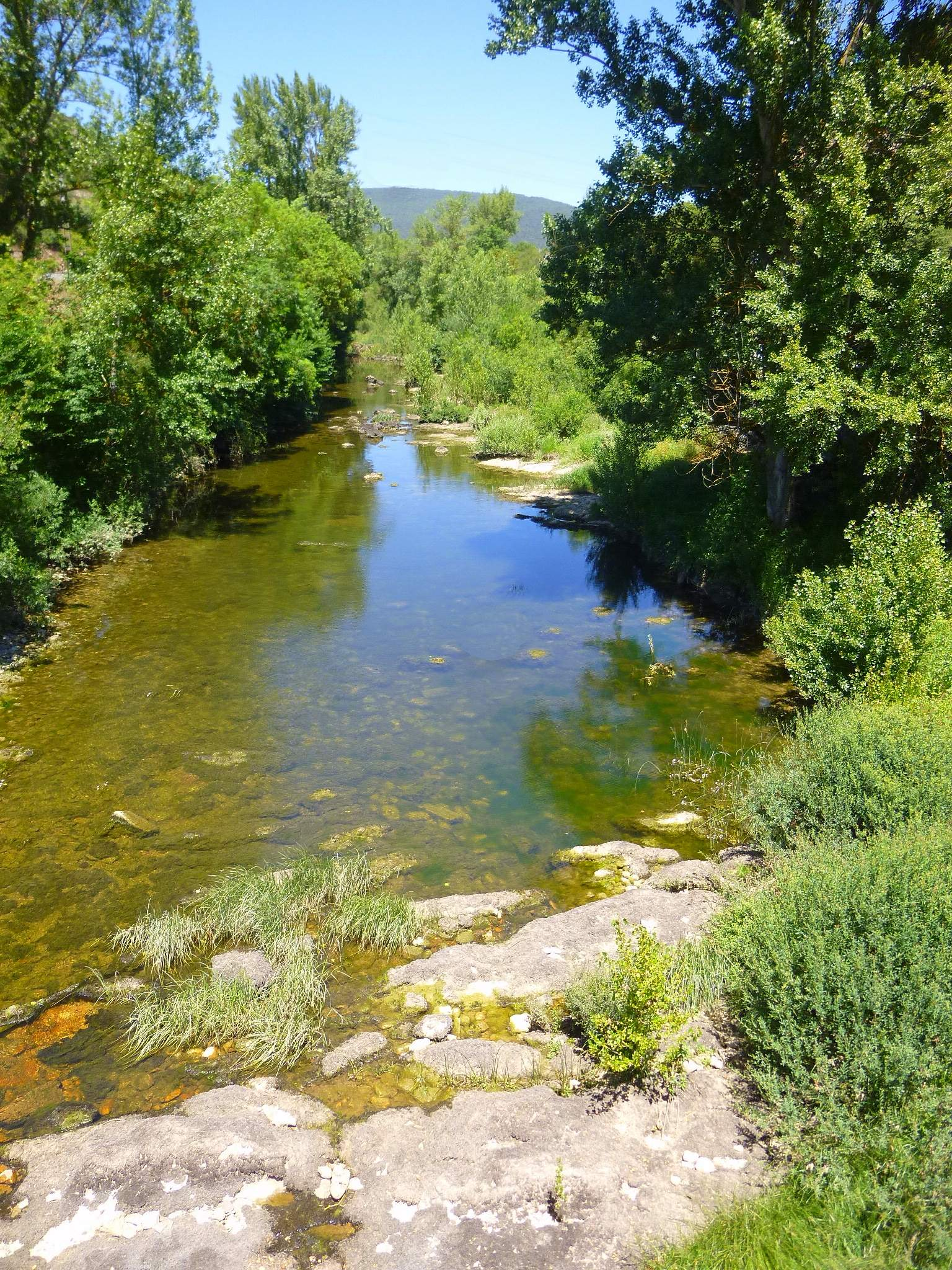 Río Bayas a su paso por Pobes (Ribera Alta, Álava).